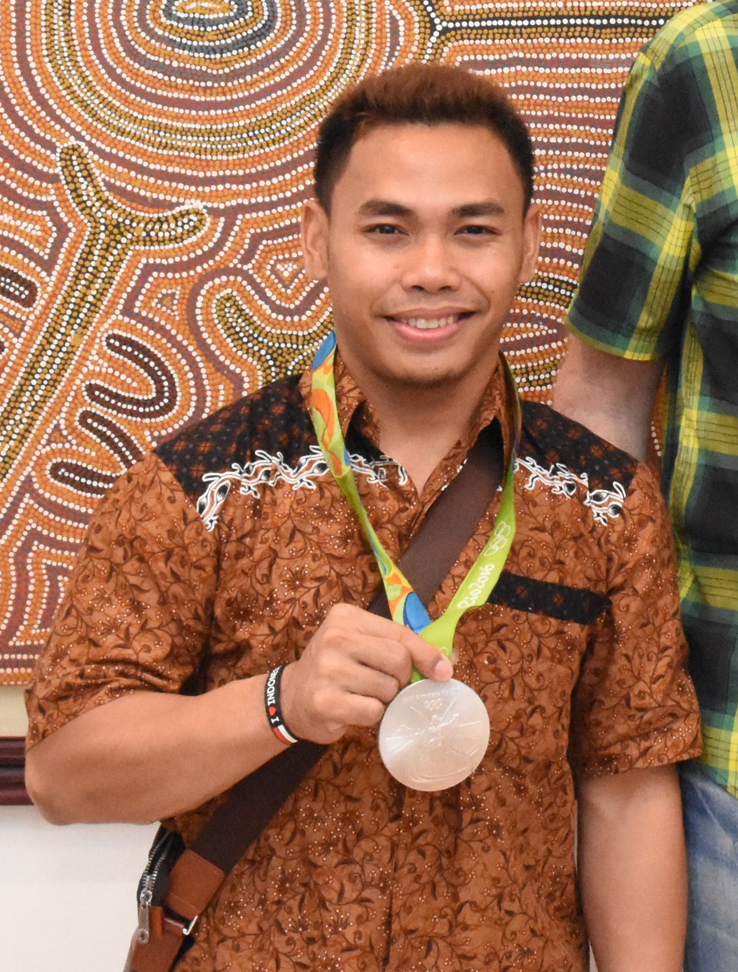 Semalam (06/09) Dubes Paul Grigson menepati janjinya mengundang dua peraih medali perak Olimpiade Rio de Janeiro 2016, Eko Yuli Irawan dan Sri Wahyuni untuk makan malam di kediamannya. Kedua atlet angkat besi Indonesia tersebut dan para tamu lainnya menikmati steak daging sapi Australia yang telah disiapkan oleh perusahaan asal Australia, Elders. Seperti diketahui, tim angkat besi Indonesia untuk Olimpiade Rio bekerja sama dengan Elders dalam hal pasokan daging sapi untuk para atlet angkat besi.